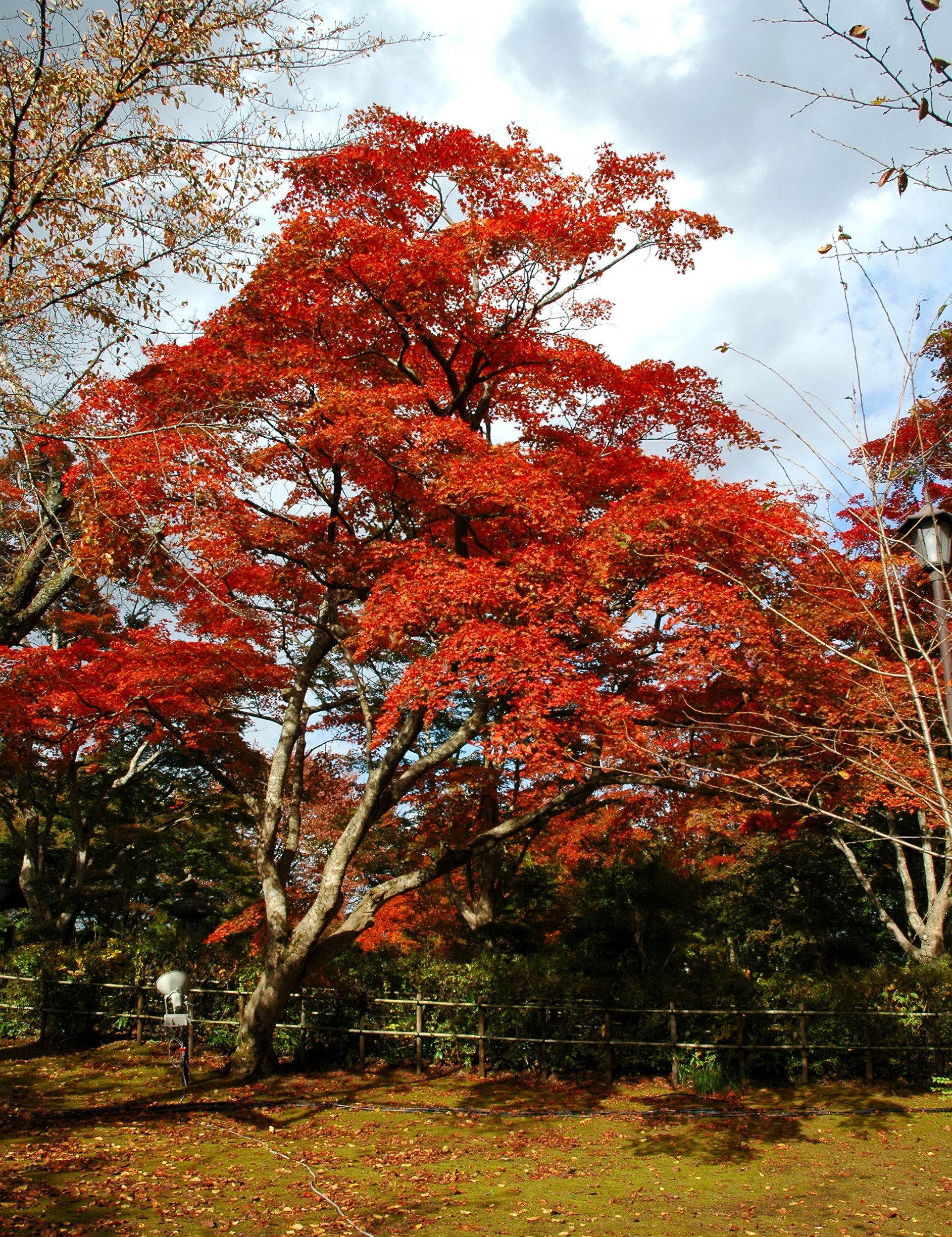 Momijien, Nagaoka, Niigata (長岡市（旧ja:越路町）のもみじ園)